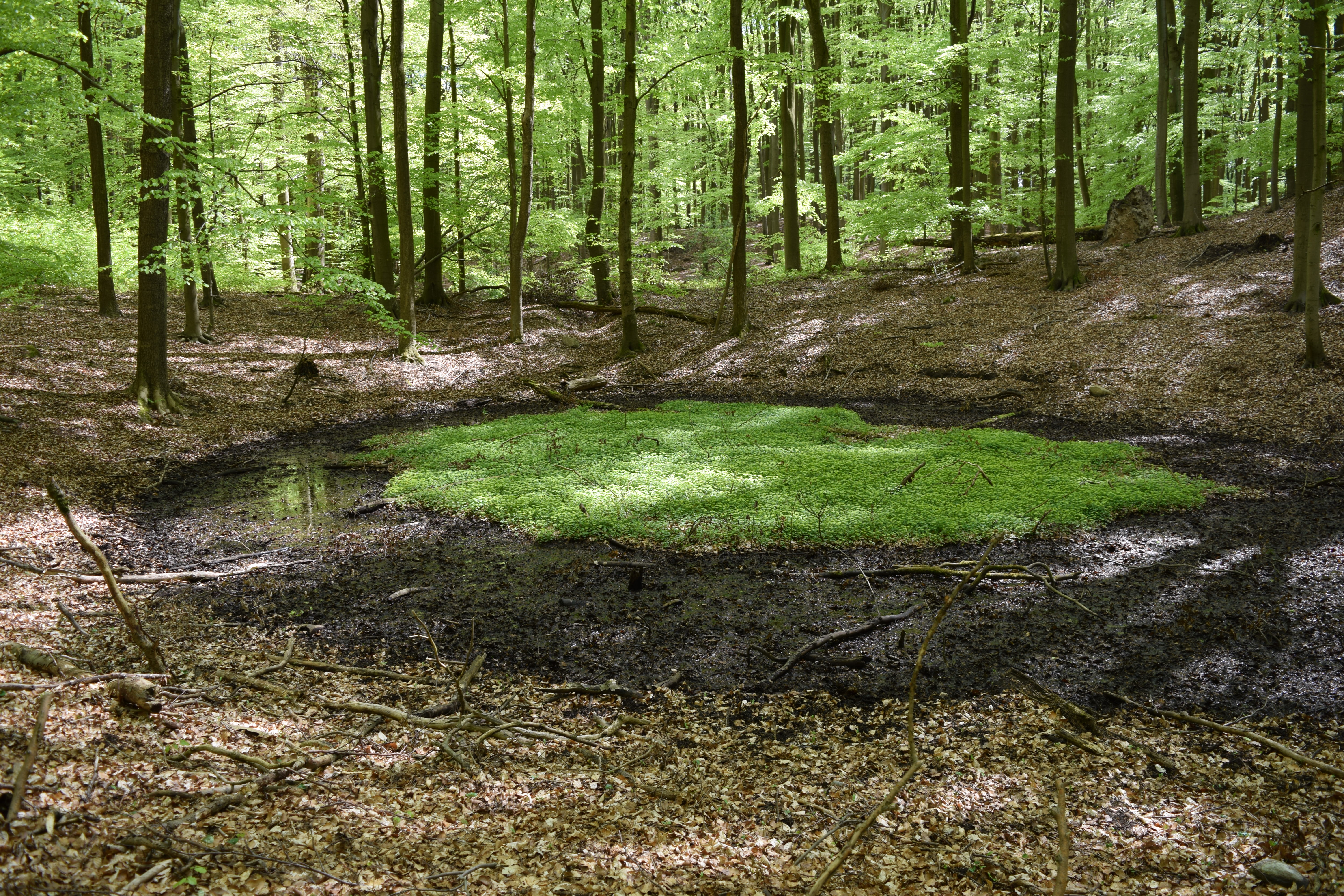 Milzkraut-Teppich auf einem Quelltümpel im Buchenwald Grumsin; UNESCO-Weltnaturerbe "Buchenurwälder der Karpaten und Alte Buchenwälder Deutschlands"; Naturschutzgebiet Grumsiner Forst/Redernswalde; Biosphärenreservat Schorfheide-Chorin